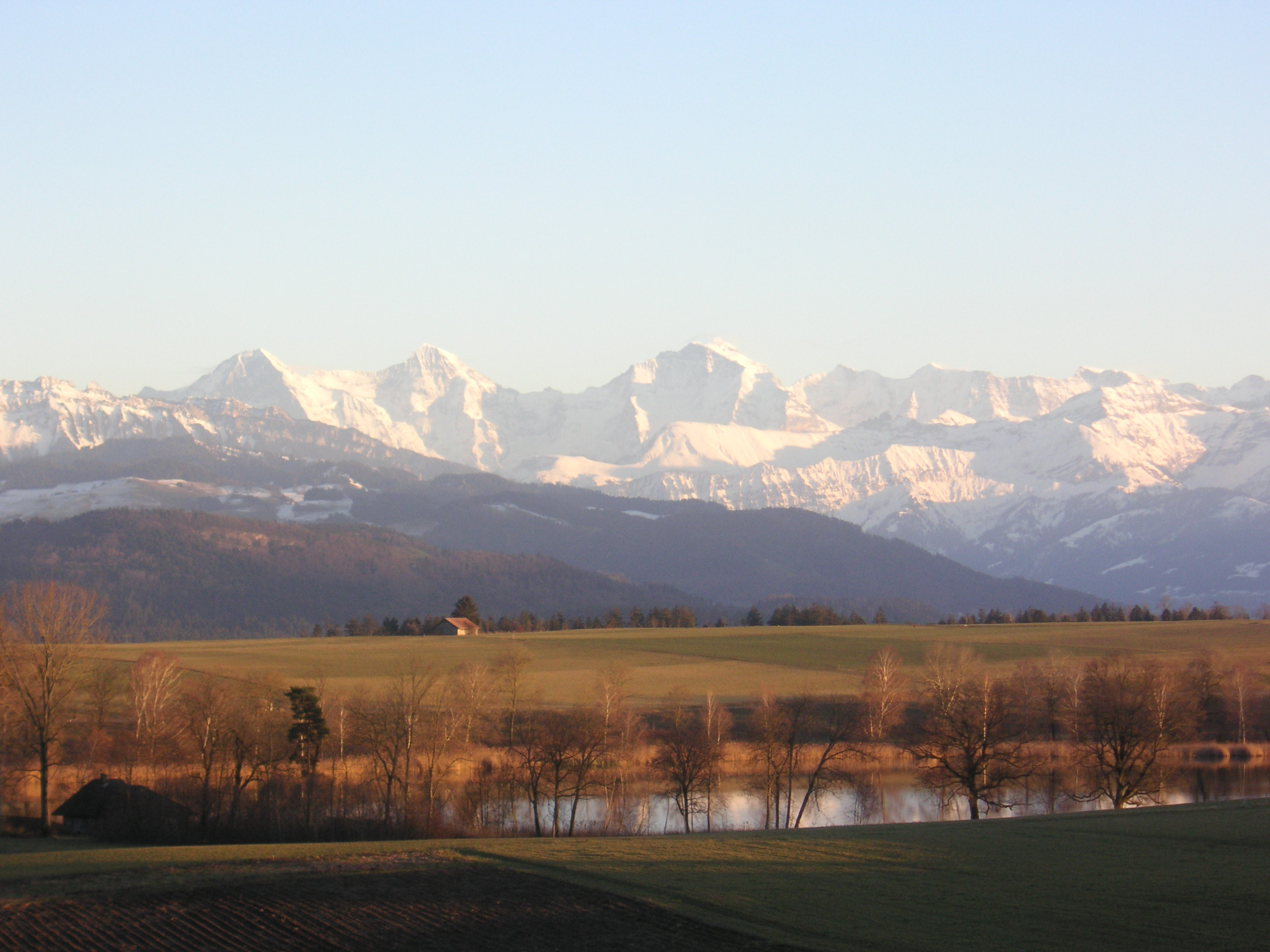 Gerzensee mit Eiger, Mönch und Jungfrau im Hintergrund.